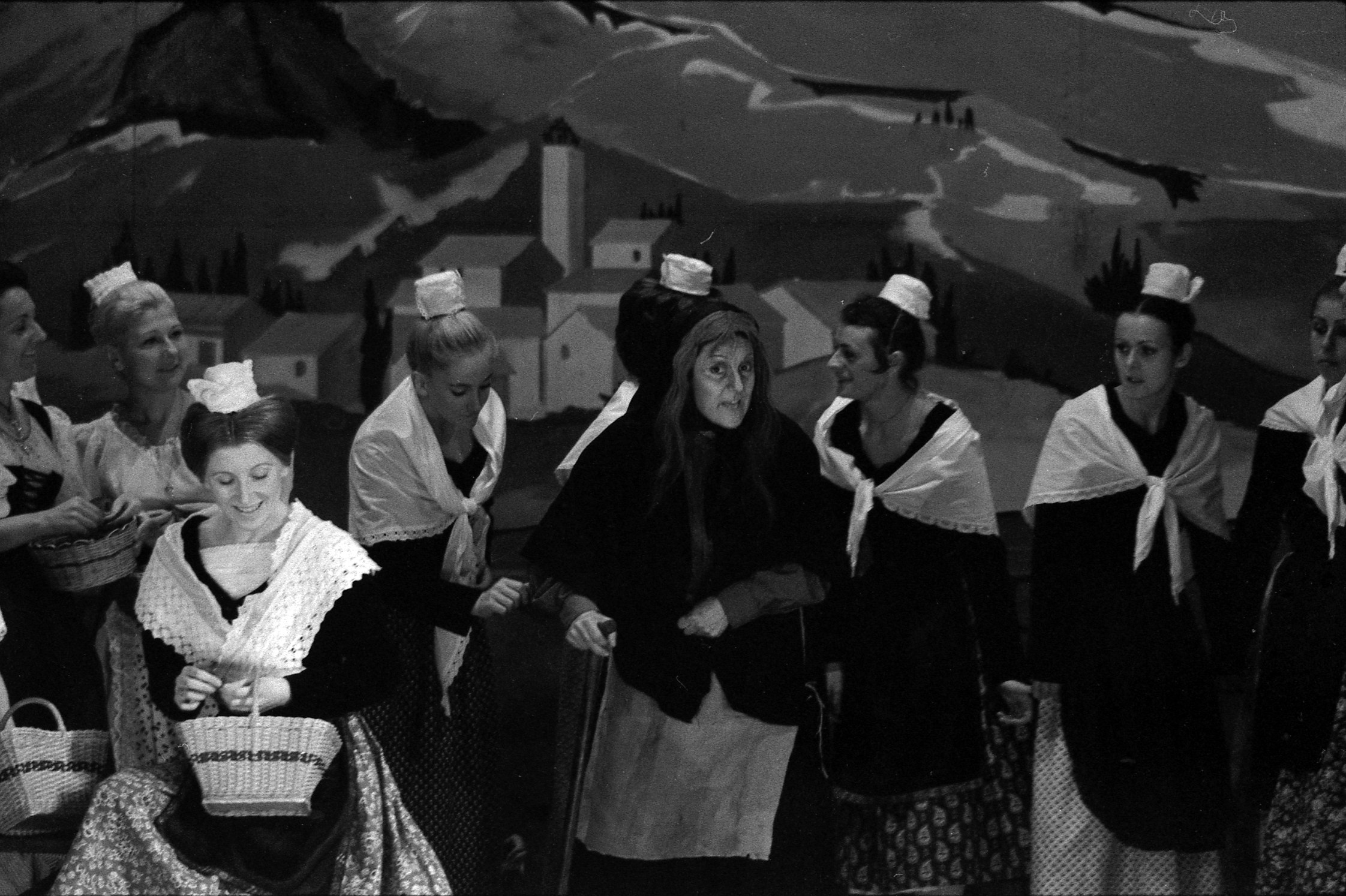 Théâtre du Capitole. Le 18 novembre 1971. Vue de la représentation de Mireille au théâtre du Capitole.